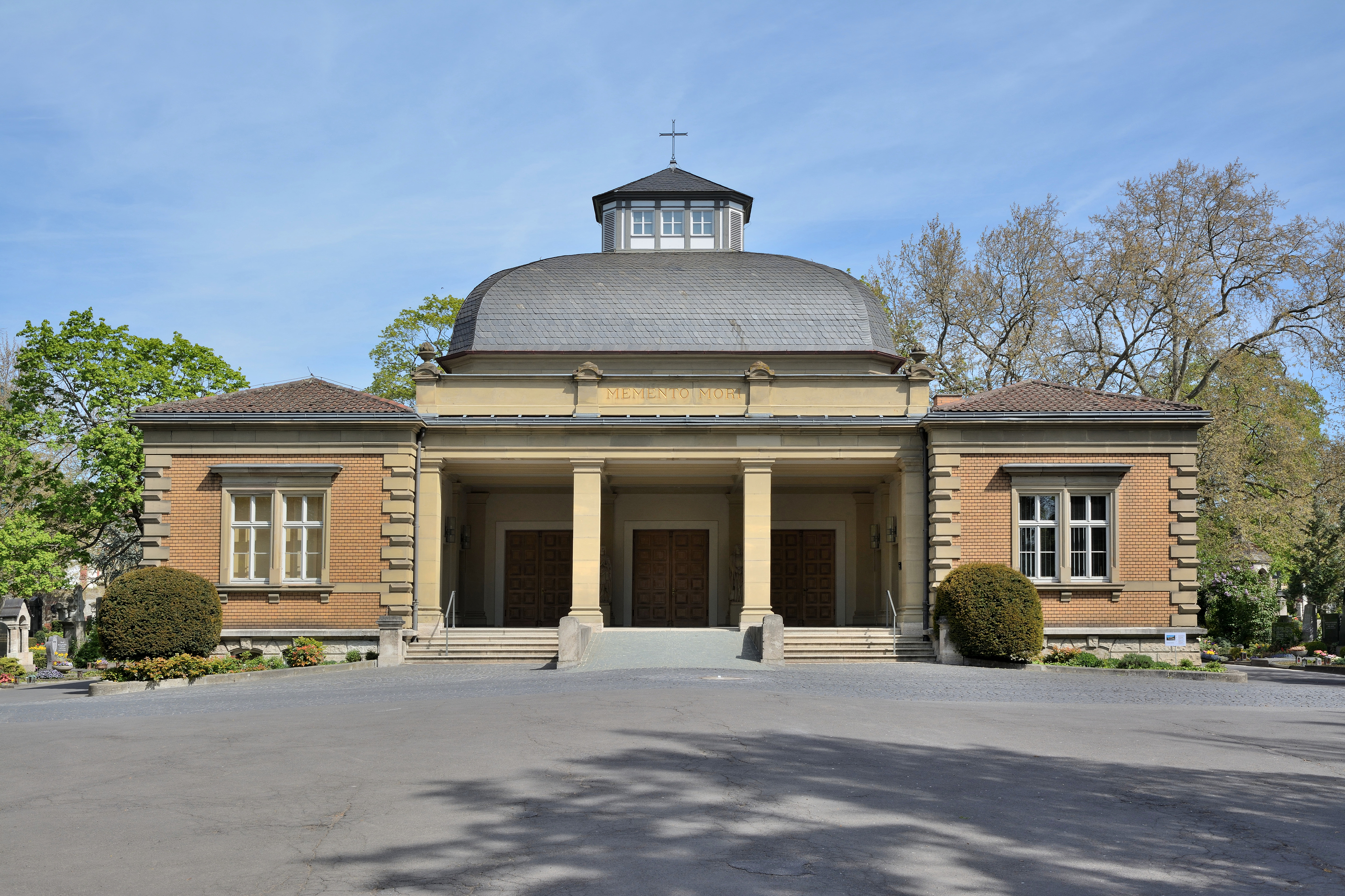 Impressionen vom Hauptfriedhof Würzburg Aussegnungshalle